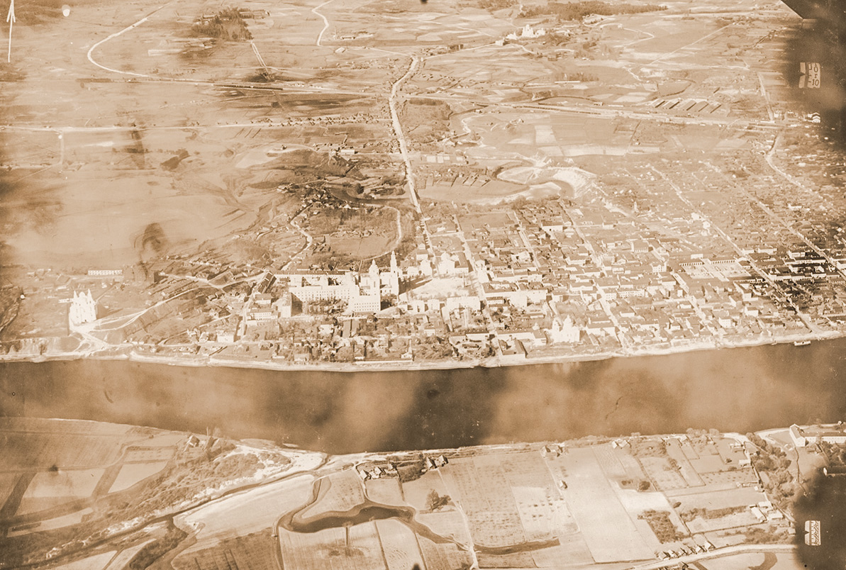 Беларуская (тарашкевіца): Полацак (Połacak). Аэрафотаздымак